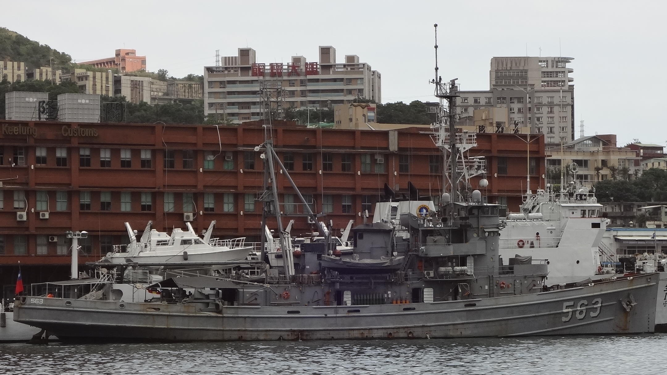 基隆海關大樓前，中華民國海軍大台軍艦（ATF-563）停泊基隆港。